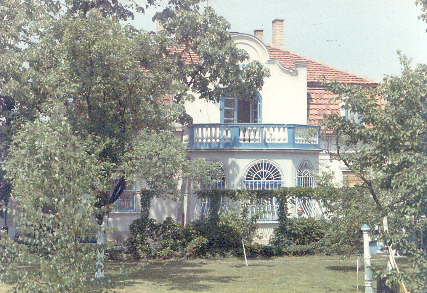 Вила Драгослава